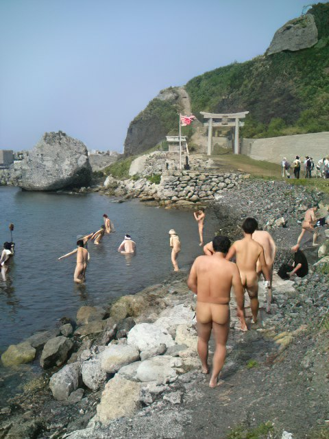 沖ノ島海水禊